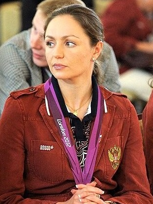 Российские синхронистки - Ищенко, Давыдова, Громова